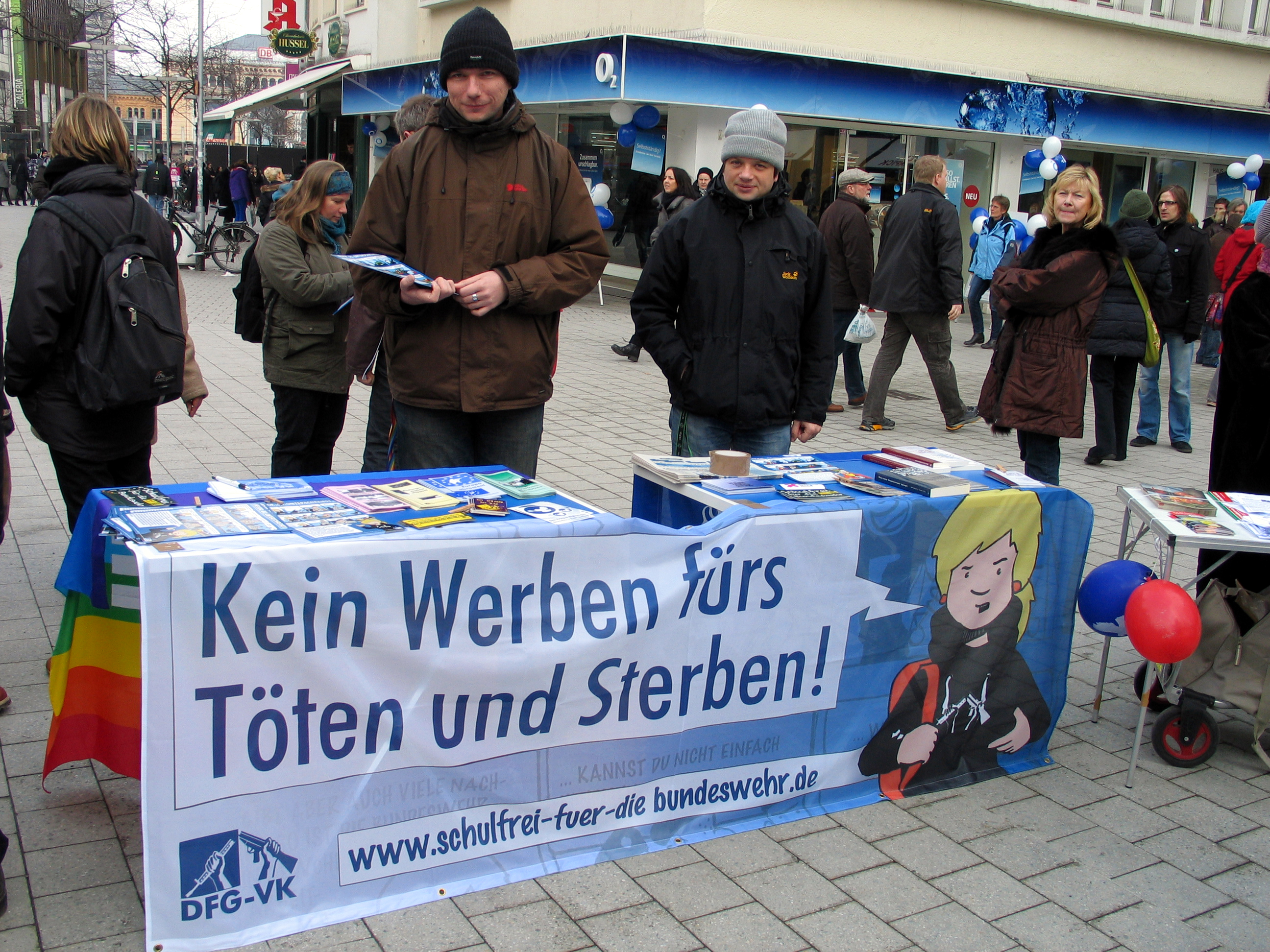 Fotos vom Ostermarsch 2013 in Hannover, veranstaltet von attac Hannover, DFG-VK Hannover (Deutsche Friedensgesellschaft - Vereinigte KriegsdienstgegnerInnen), DKP Hannover-Kreis, Friedensbüro Hannover e.V., Die Linke, Region Hannover, Kargah e.V., Initiative "Kein Militär mehr", Kurdistan Volkshaus, MISO-Netzwerk Hannover, MC Kuhle Wampe, Hannover, radio flora Hannover, unique planet, VVN-BdA Hannover, Zukunftsforum hannoverscher GewerkschafterInnen und vielen anderen ...